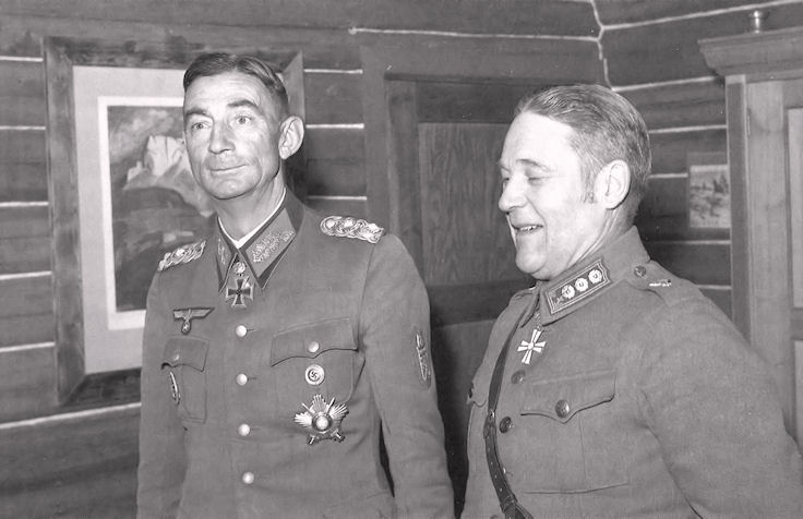 Pohjois-Suomen saksalaisten joukkojen komentaja kenraalieversti Eduard Dietl ja yhteysesikunta Roin päällikkö Oiva Willamo Dietlin Rovaniemelle rakennuttamassa hirsimajassa syyskuussa 1943.